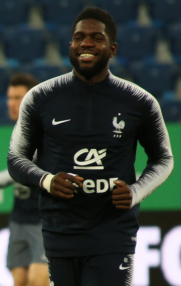 Звёзды сборной Франции готовятся к матчу с Россией